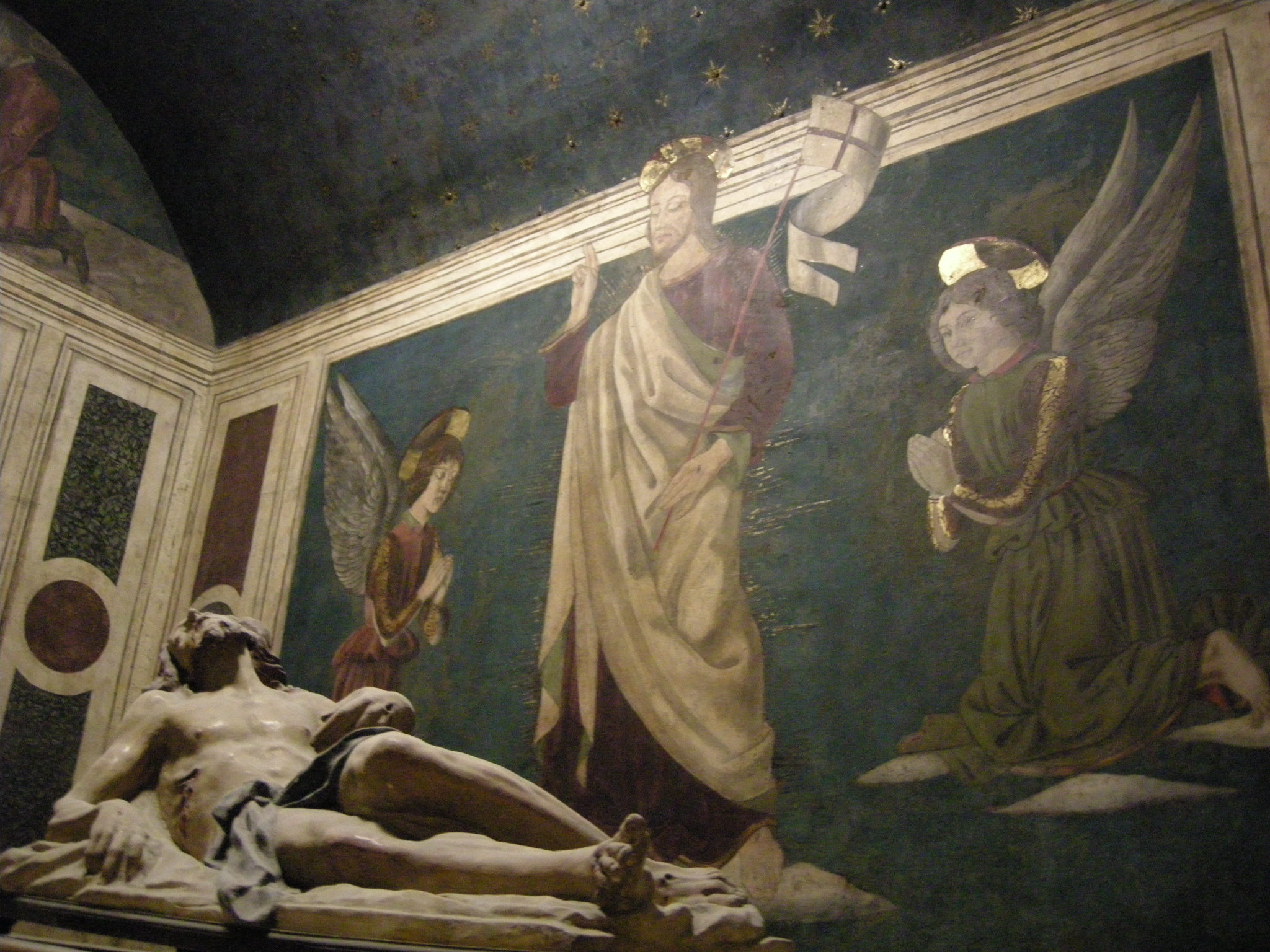 Cappella del santo sepolcro,tempietto, interno